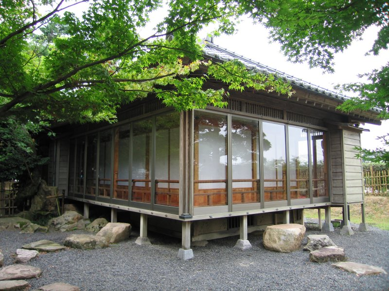 鳥取城宝扇庵（旧扇御殿化粧の間）。鳥取城に残る藩政時代の唯一の建造物。